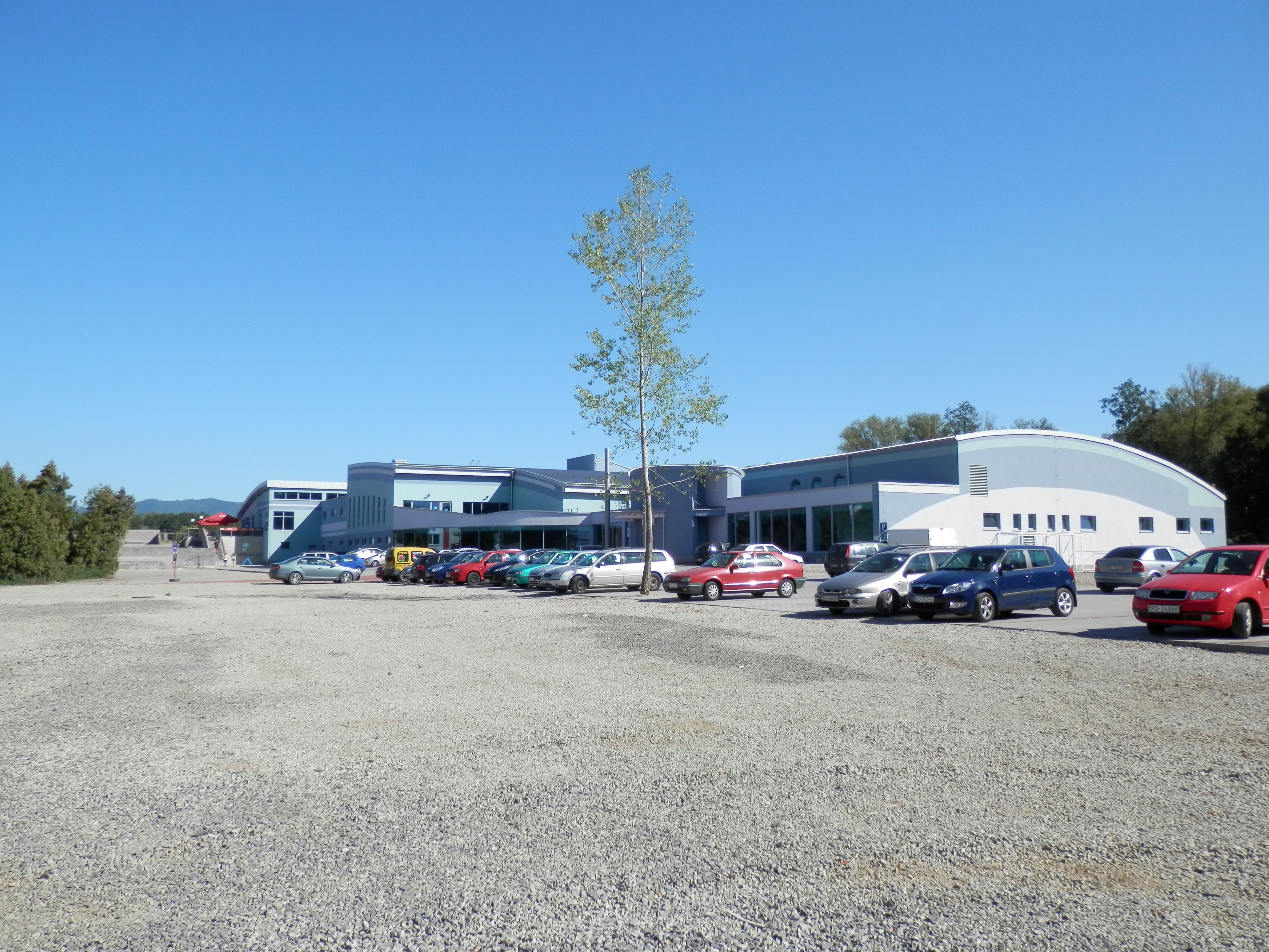 Aqupark Delňa Prešov.